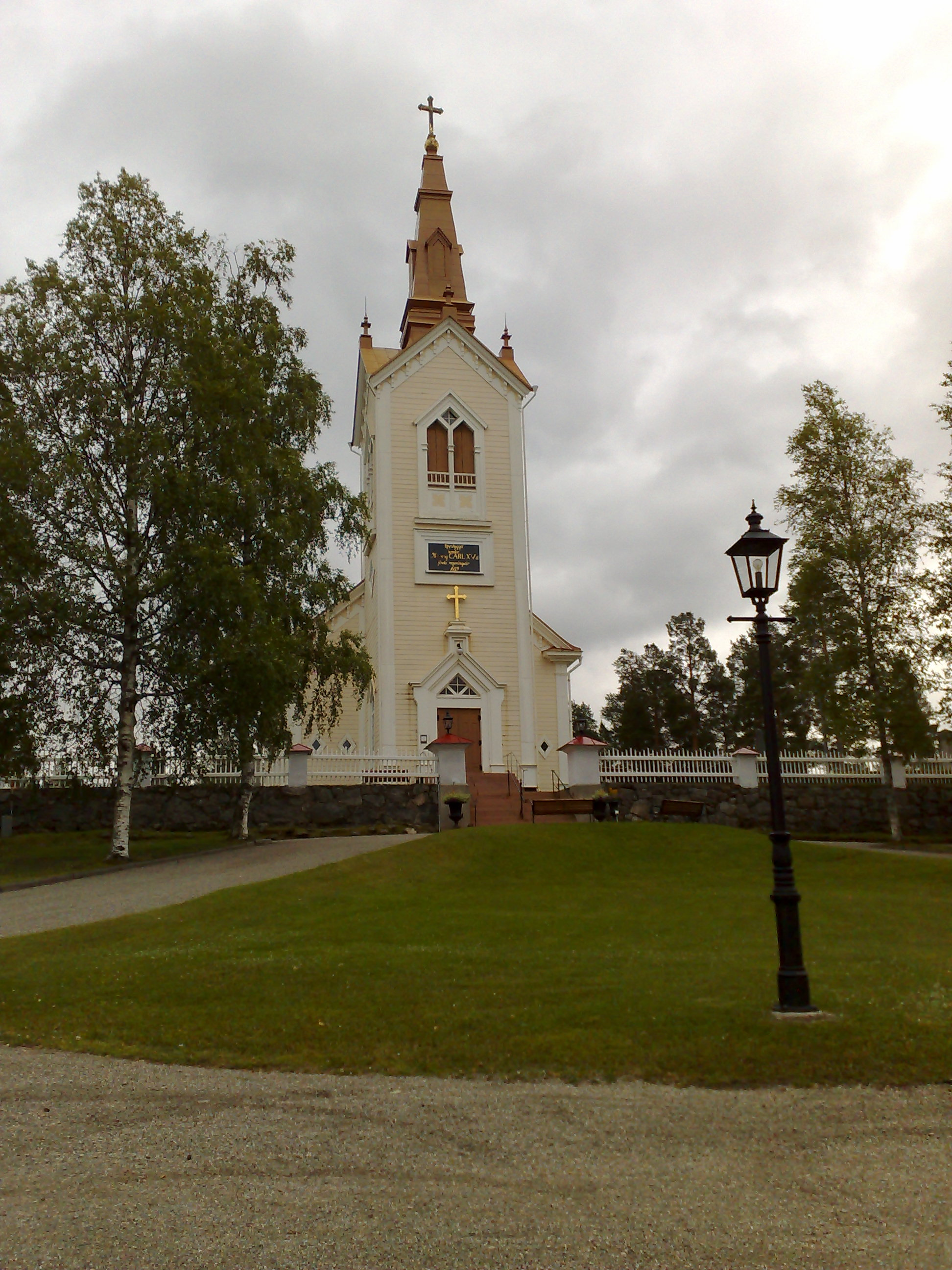 Bräcke kyrka